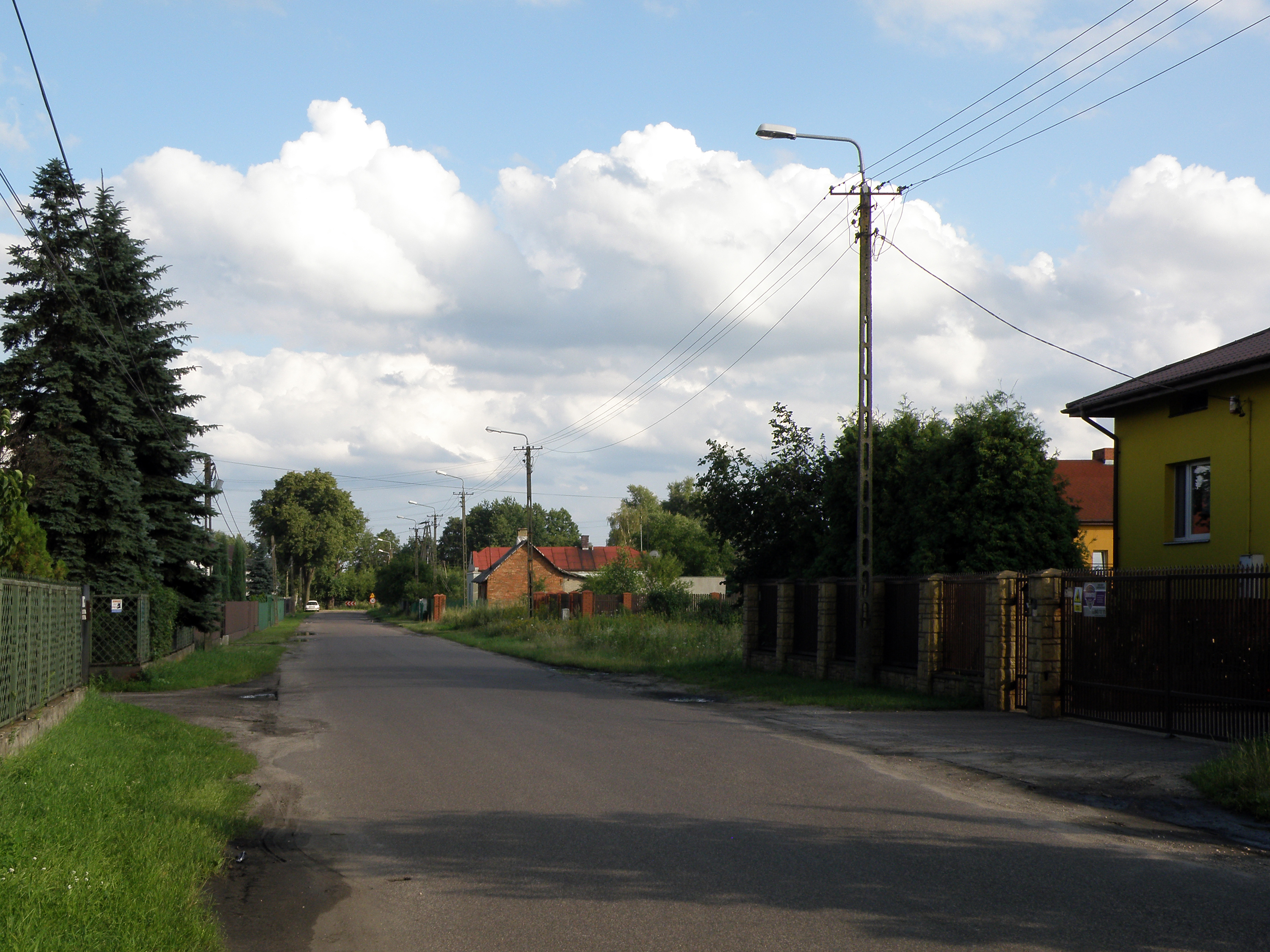 Janów - woj. mazowieckie, w pow. otwocki, gmina Karczew.